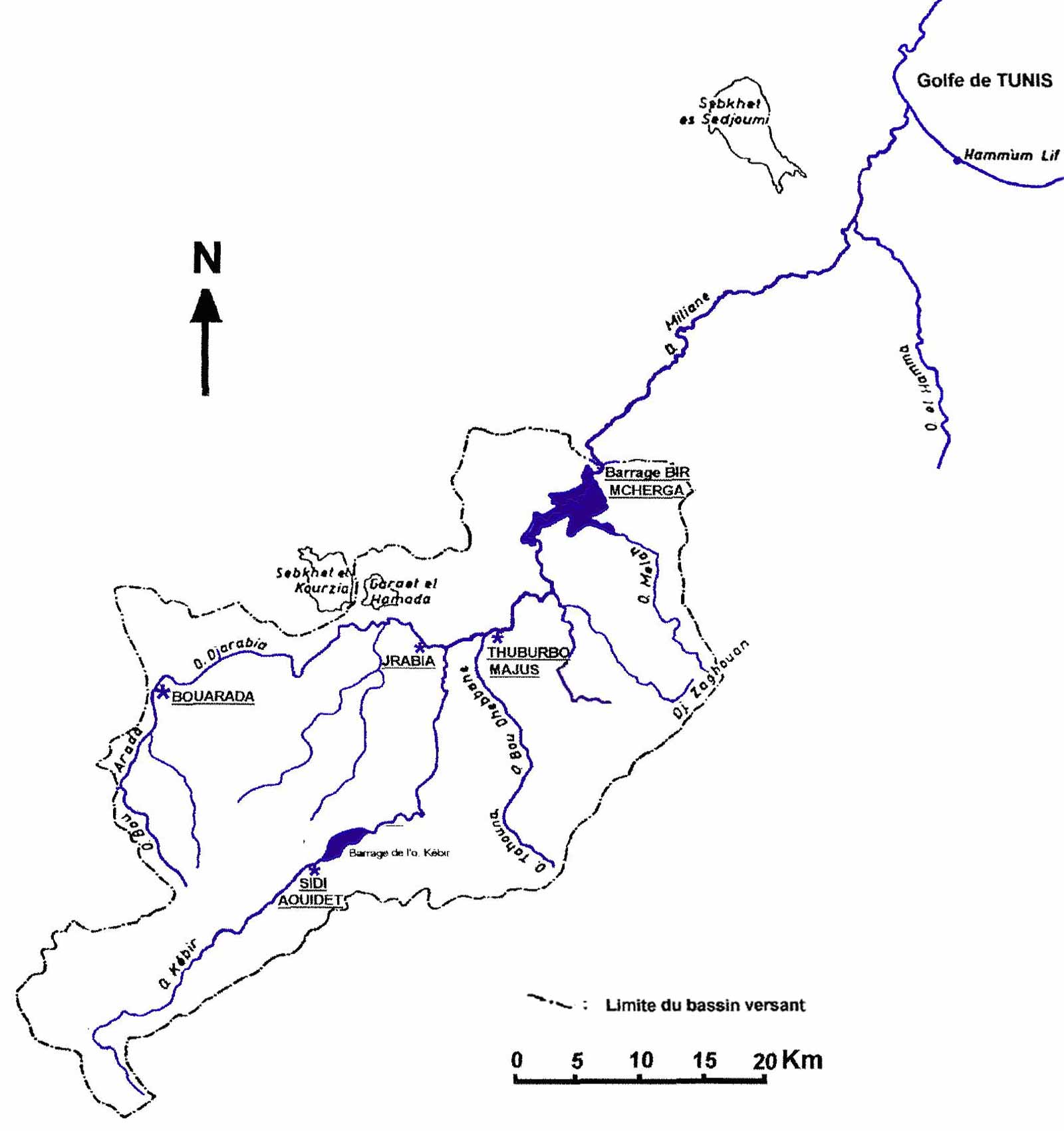 Bassin versant et cours de l'oued Miliane Collection personnelle Bertrand Bouret